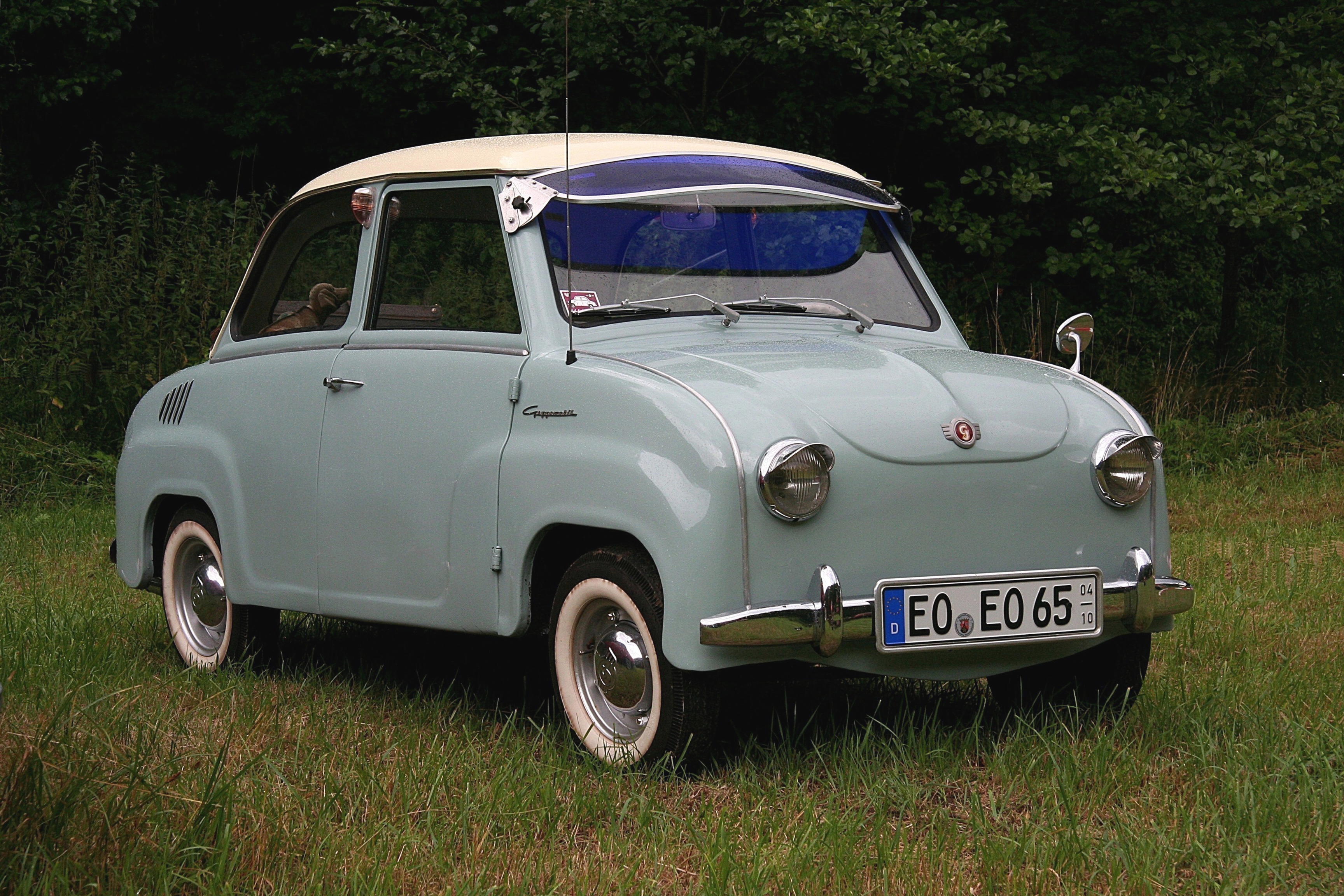 Goggomobil – Sonnenblende und Scheinwerferschirme nicht serienmäßig (Kennzeichen verändert)